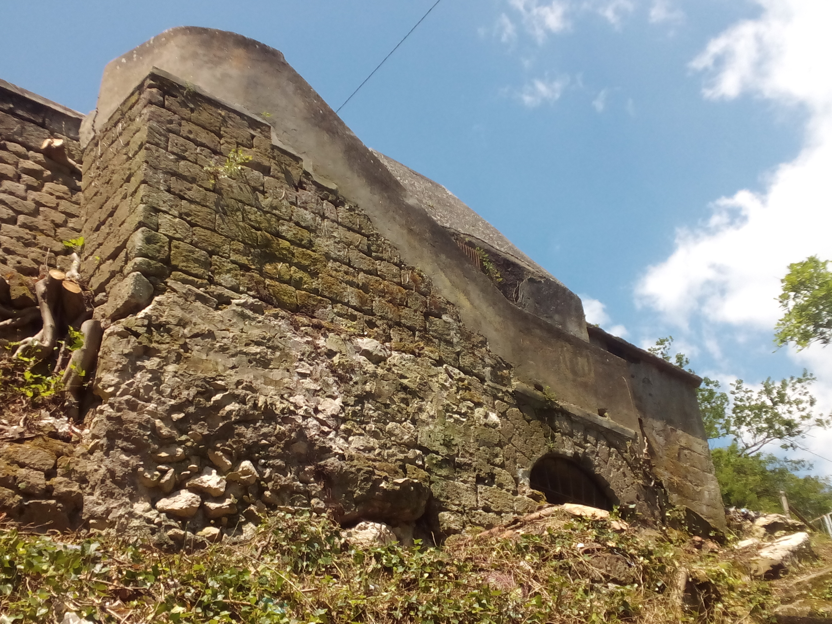 Torrino nr. 28 - Acquedotto Carolino